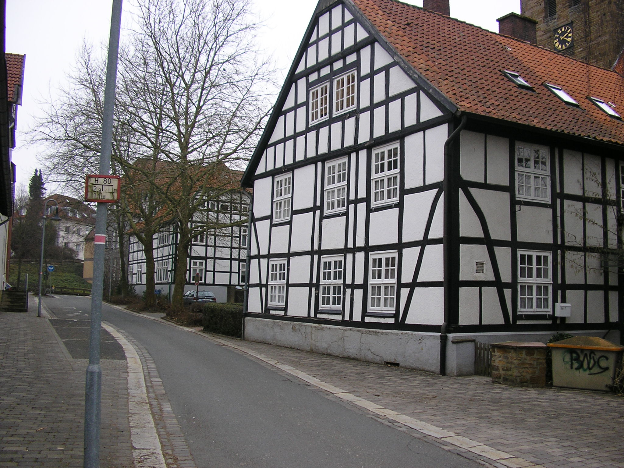 Pfarrstraße in Lübbecke This image shows a heritage building in Germany, located in the North Rhine-Westphalian city Lübbecke (no. 019). This image shows a heritage building in Germany, located in the North Rhine-Westphalian city Lübbecke (no. 018).